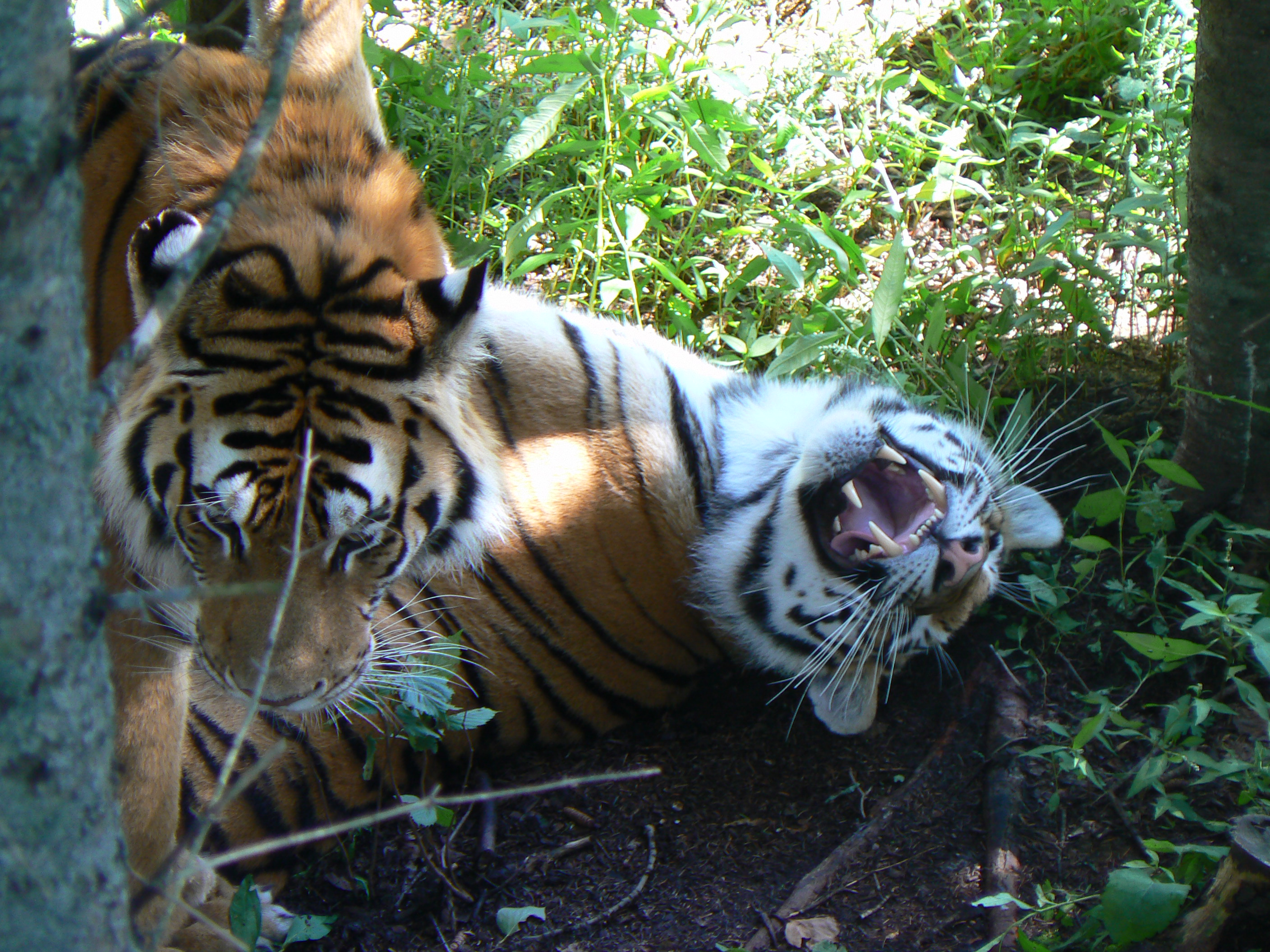 Tigre de l'Amour au zoo de St-Félicien